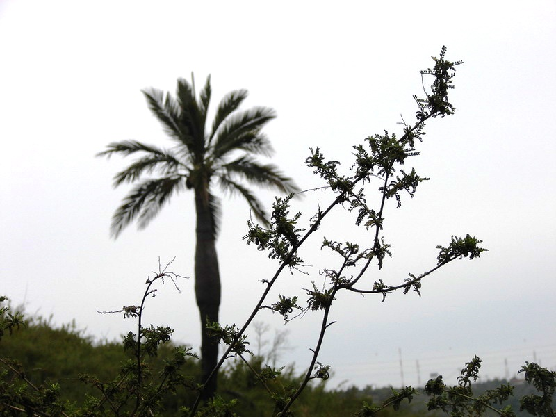 Santuario de la Naturaleza Palmar El salto. Quebrada Rodelillo